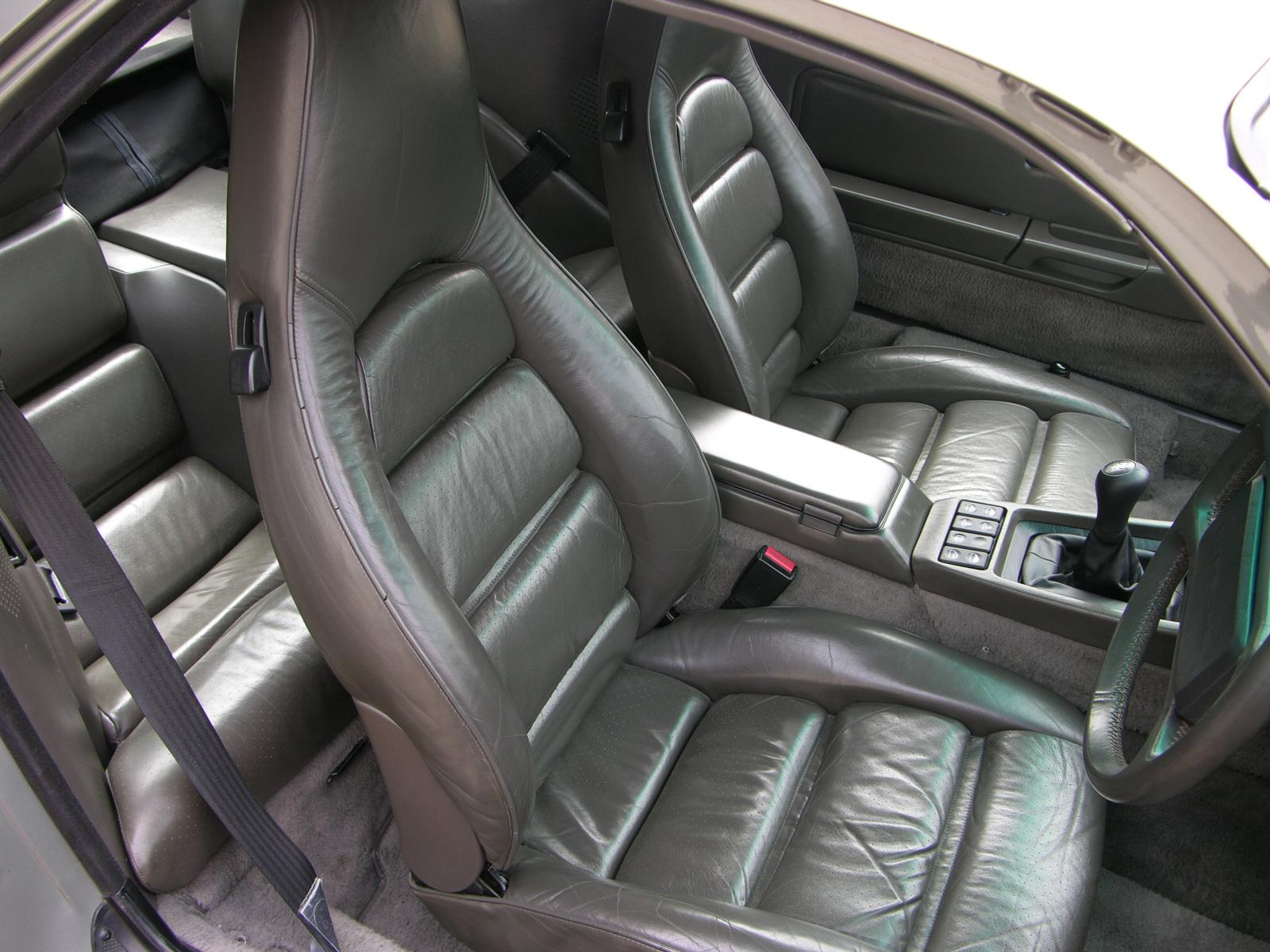 1987 Porsche 928 S4